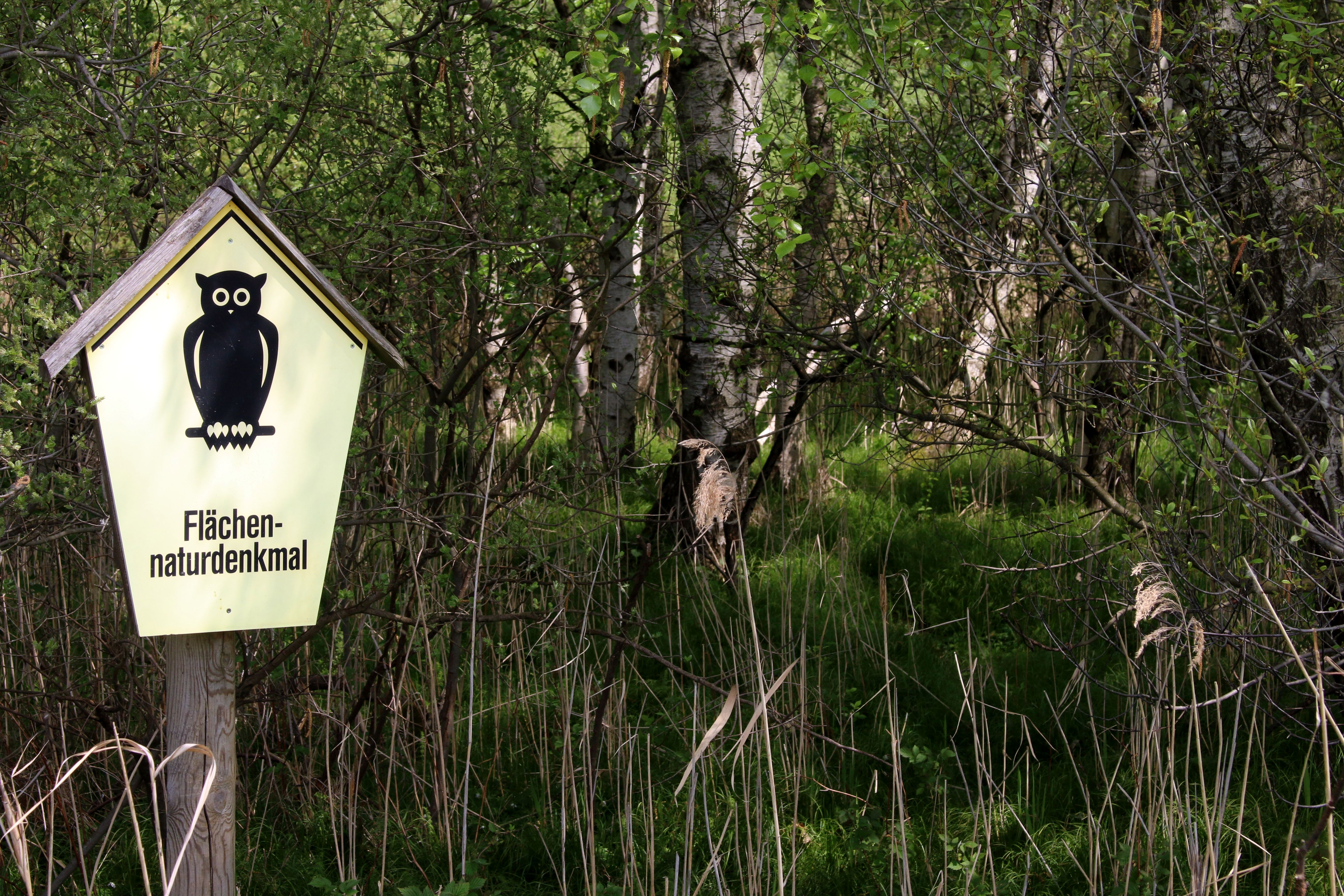 Die Frankenthaler Moorwiese war ein Flächennaturdenkmal auf der Flur der sächsischen Gemeinde Frankenthal und befindet sich im Landschaftsschutzgebiet Westlausitz. Sie ist heute Teil des FFH-Gebietes Obere Wesenitz und Nebenflüsse.